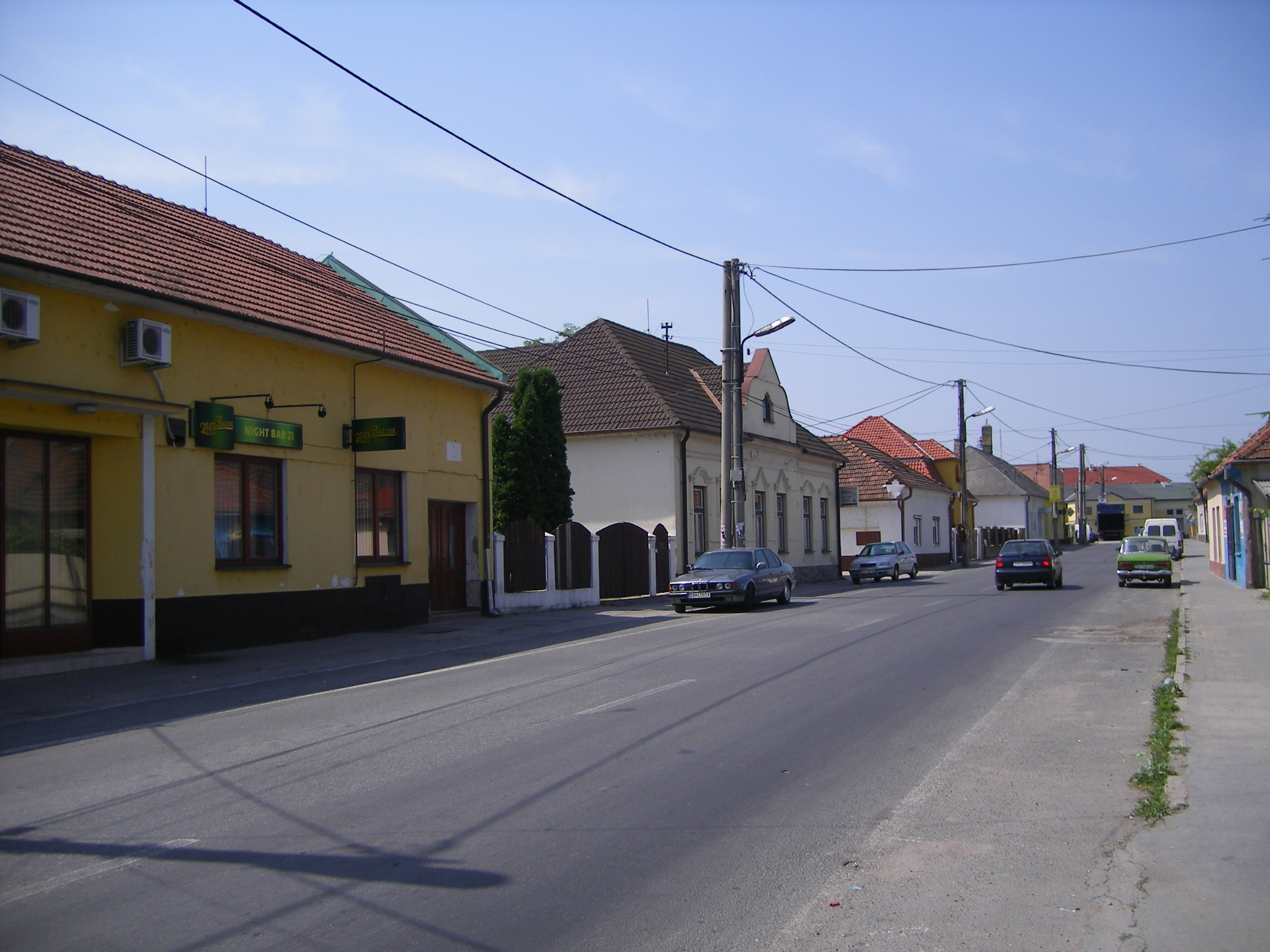 Nagymegyer - Vasút utca